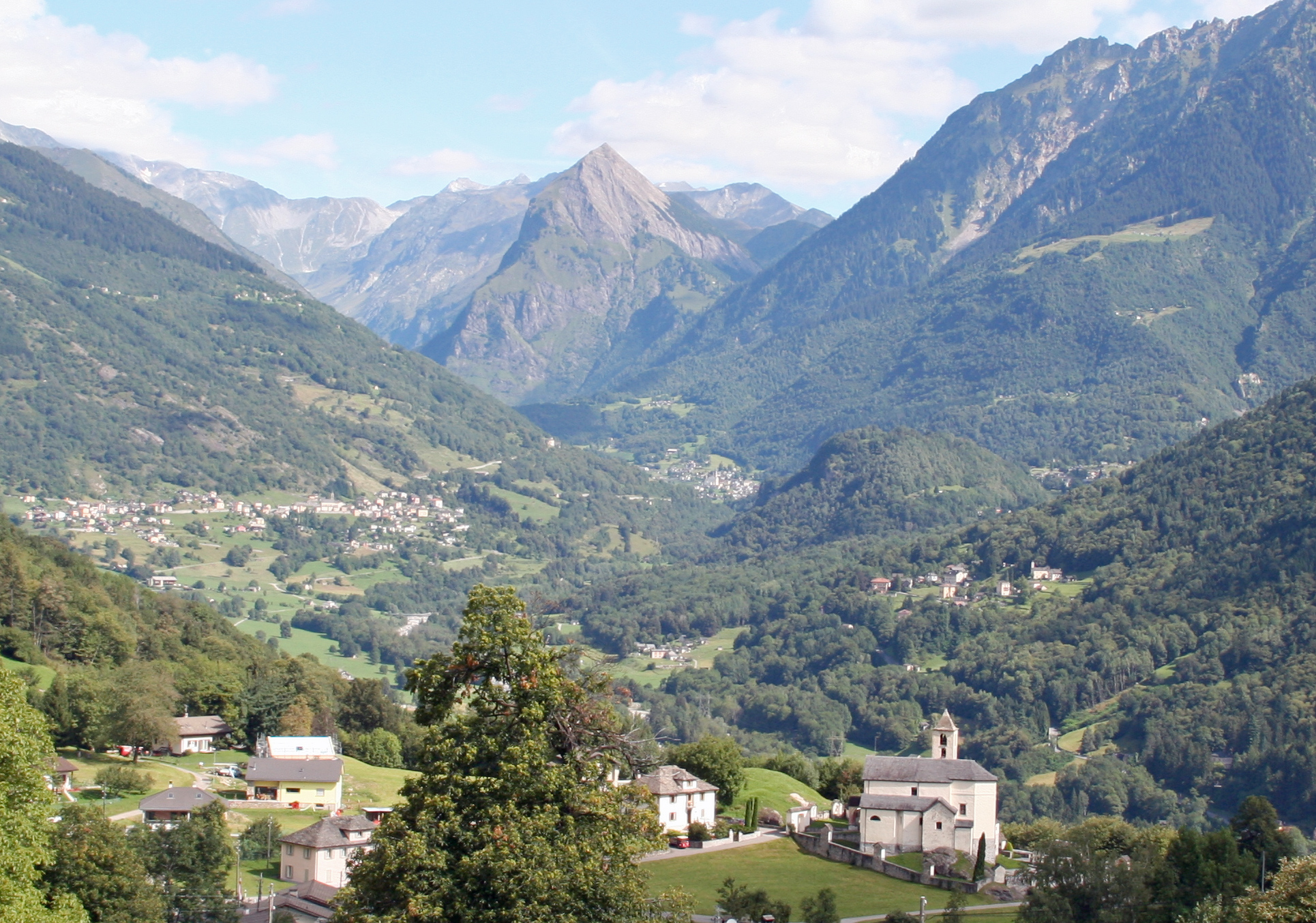 Vale di Blenio nach Norden, vorne die Kirche von Corzoneso, Sosto (2221 m) in der Bildmitte.